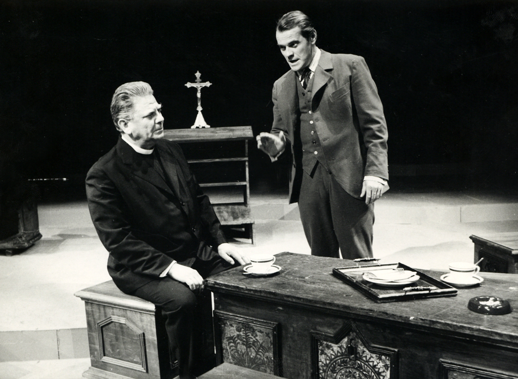 Ivan Cankar, Hlapci, Drama SNG v Ljubljani. Na fotografiji: Stane Sever (Župnik), Lojze Rozman (Jerman).